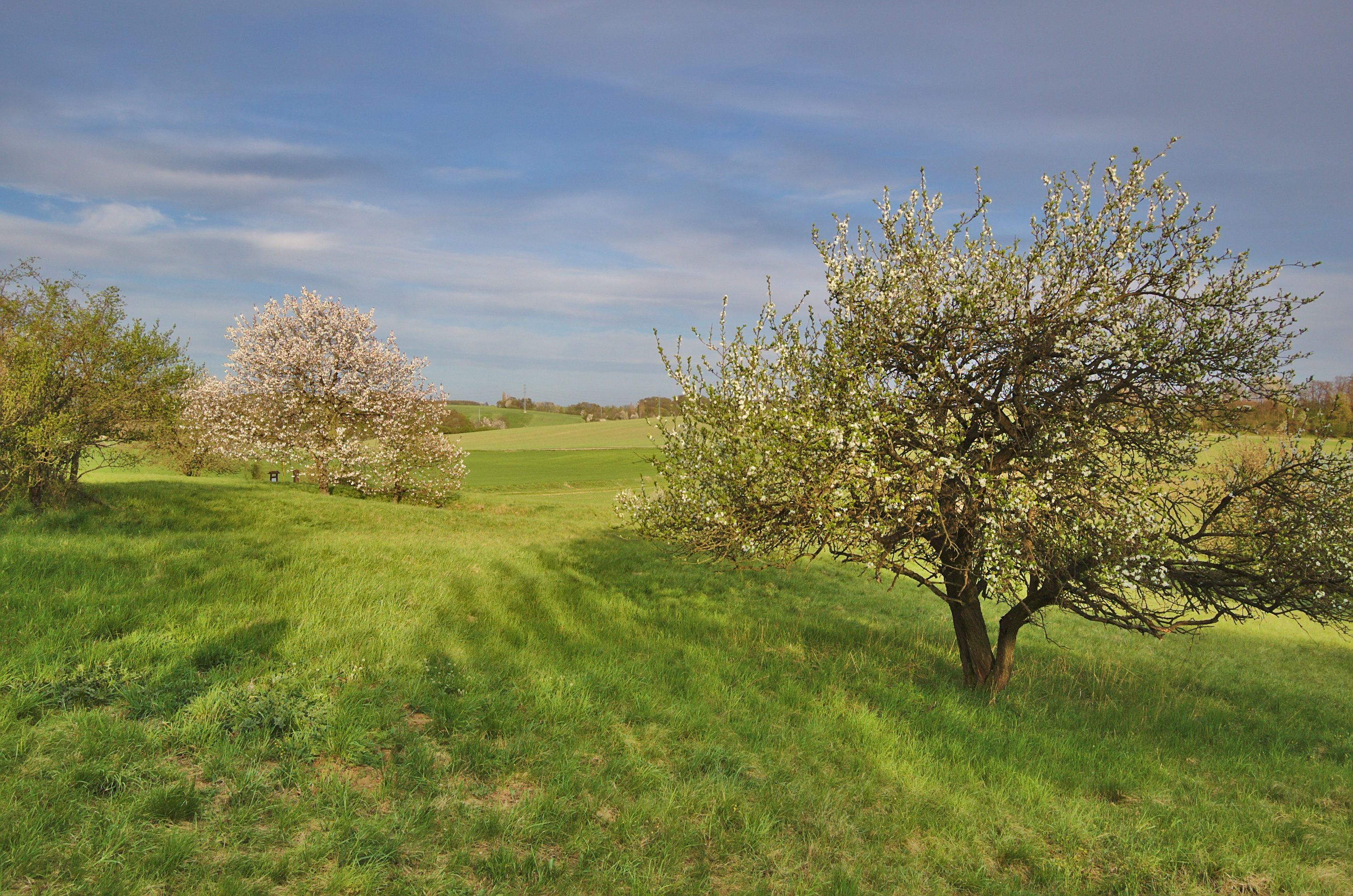 Přírodní památka U Bílých hlin, okres Olomouc